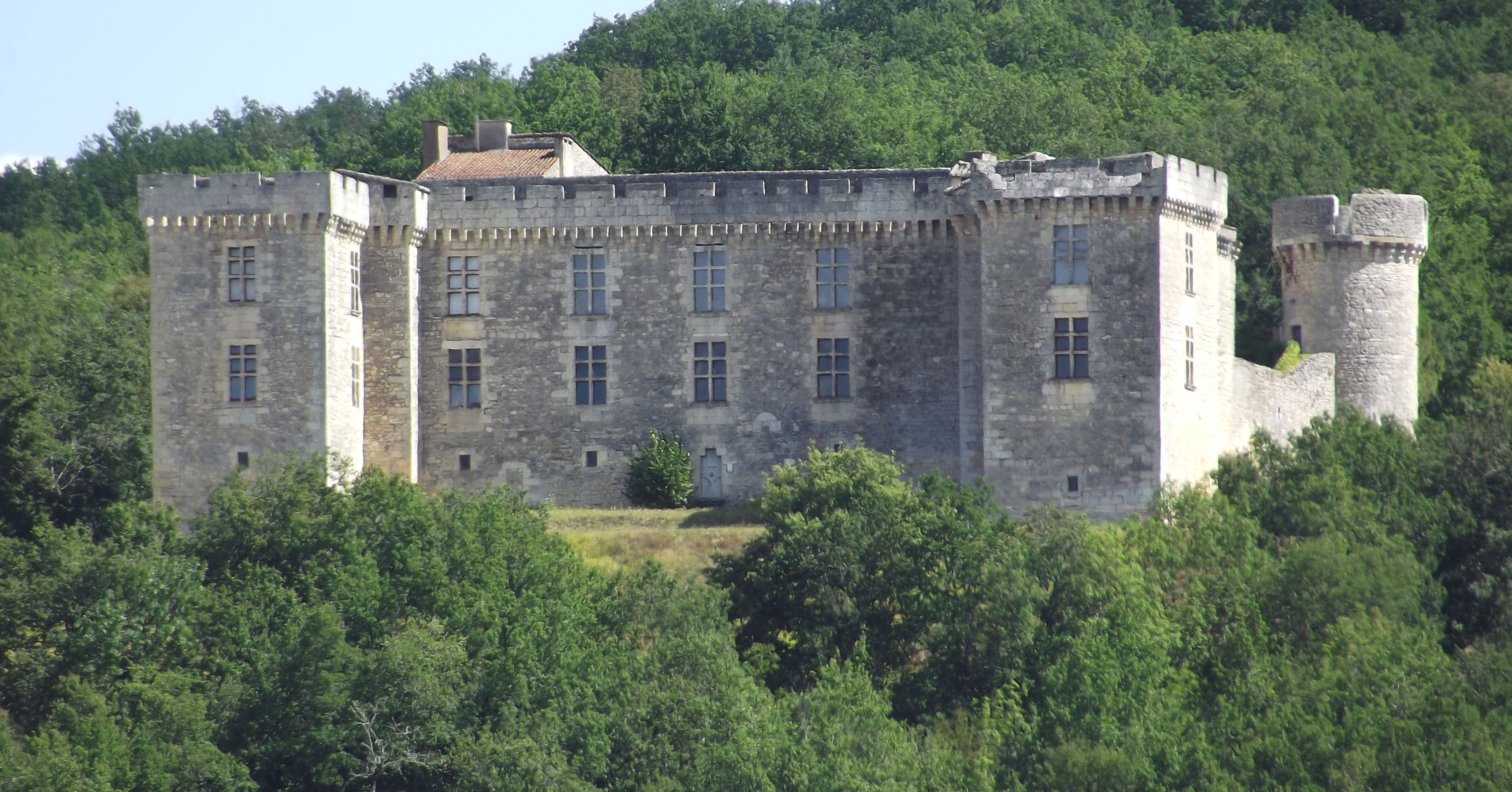 date du XIIIe siècle mais agrandi et fortifié au XVIIe